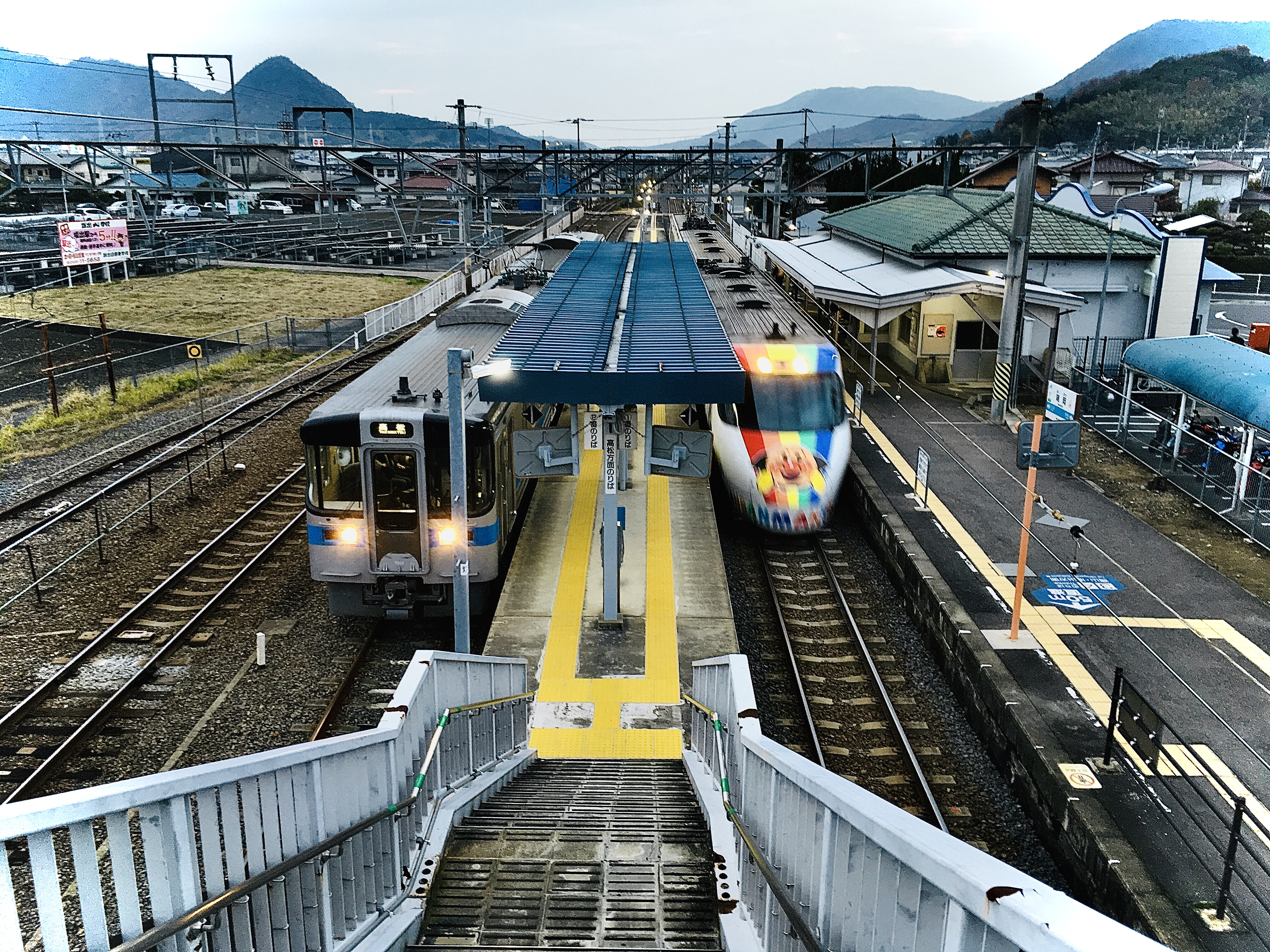 各駅停車、特急うずしお